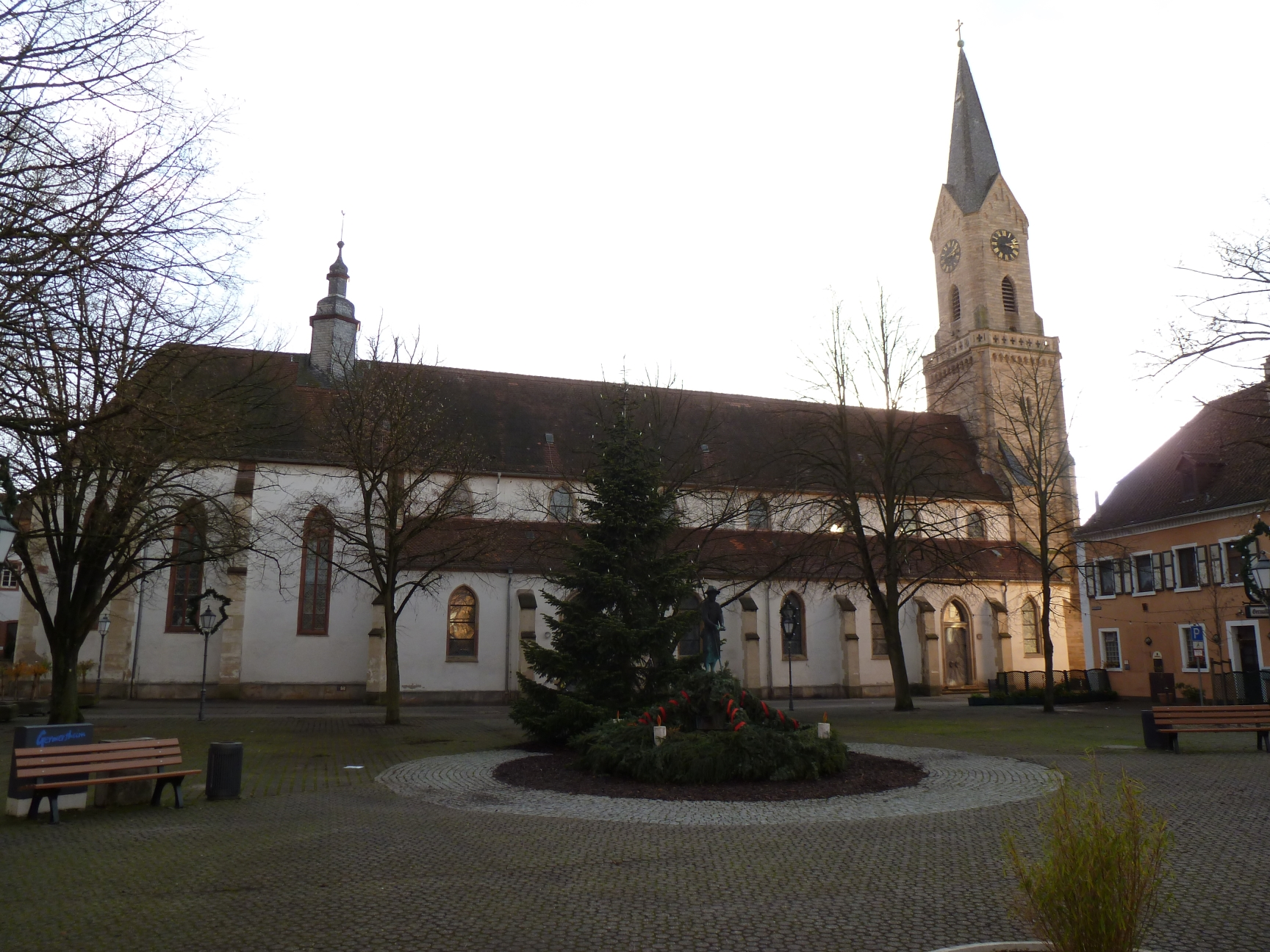 Kirche St. Jakobus, Germersheim